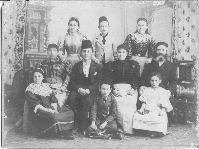 משפחת יצחק אייזיק בן-טובים ביפו 1895